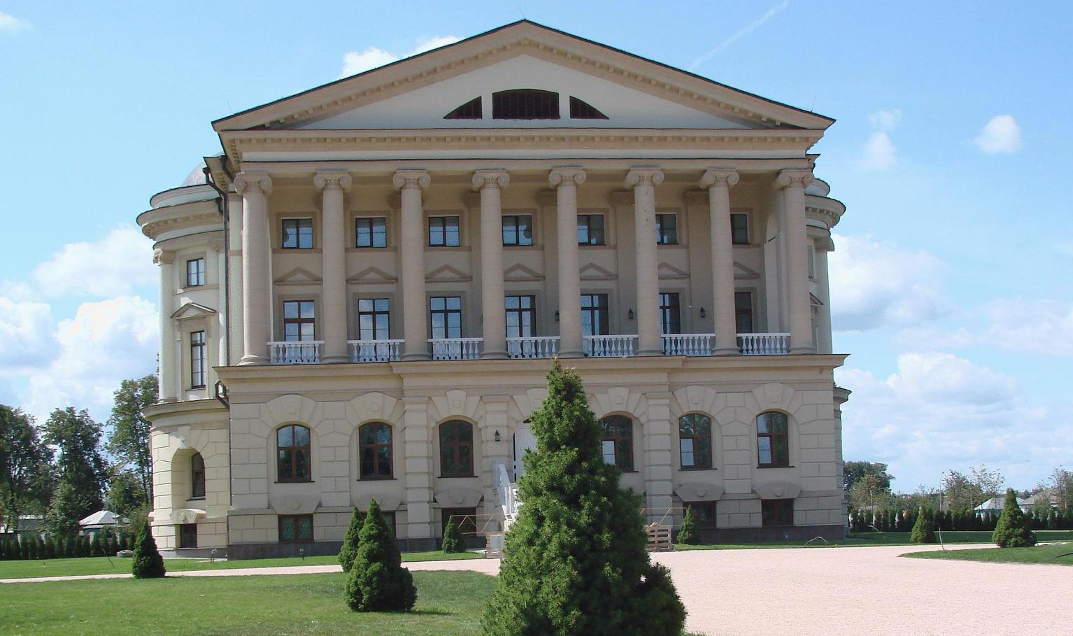 Palacio del hetman Rozumovsky.